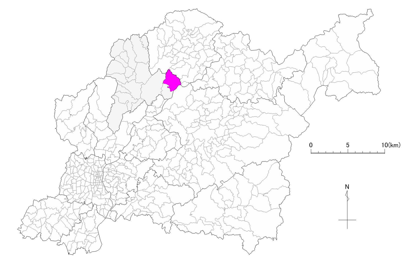 豊田市上川口町位置図